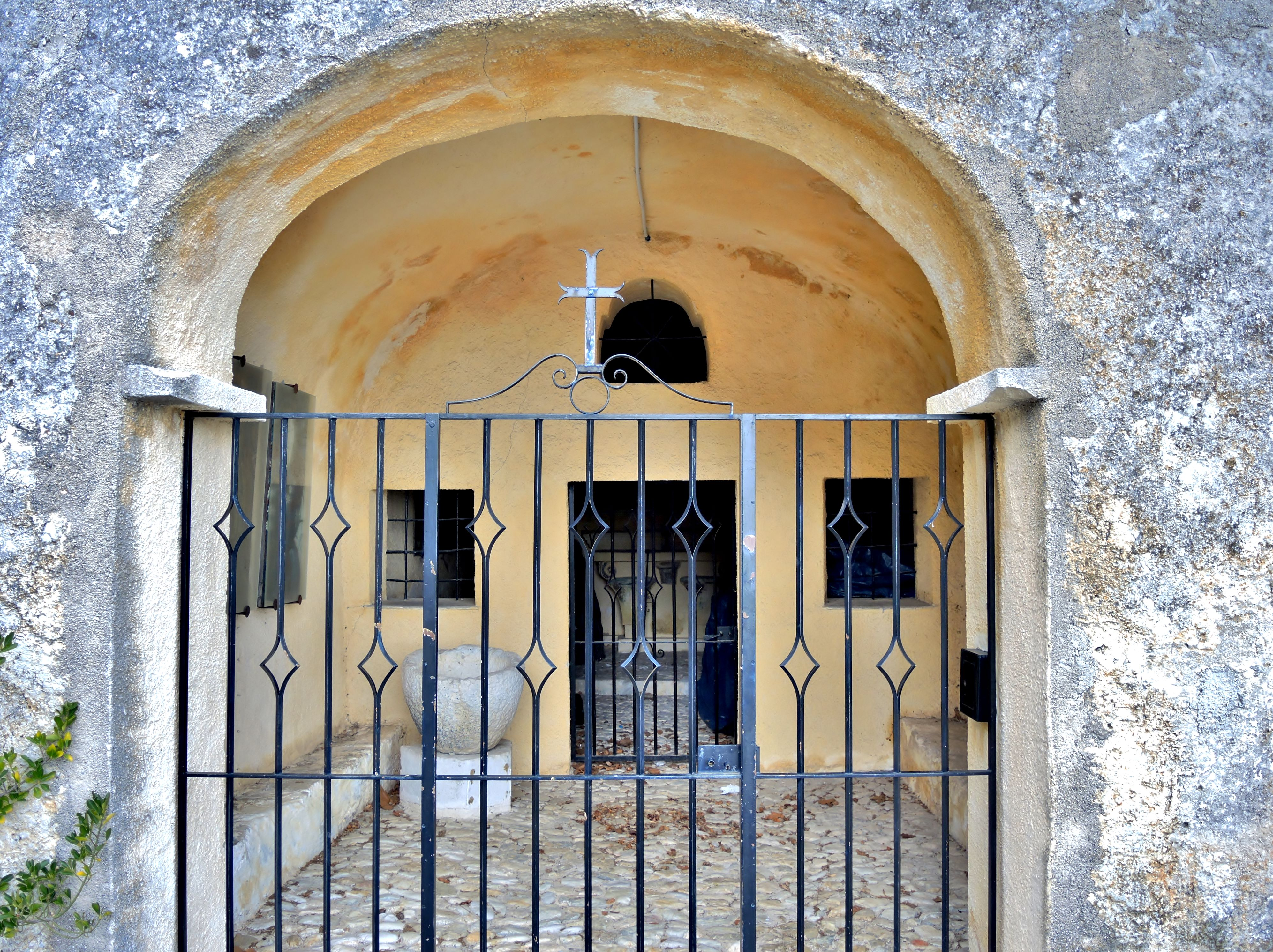 Chapelle saint Sébastien, au bas du village.